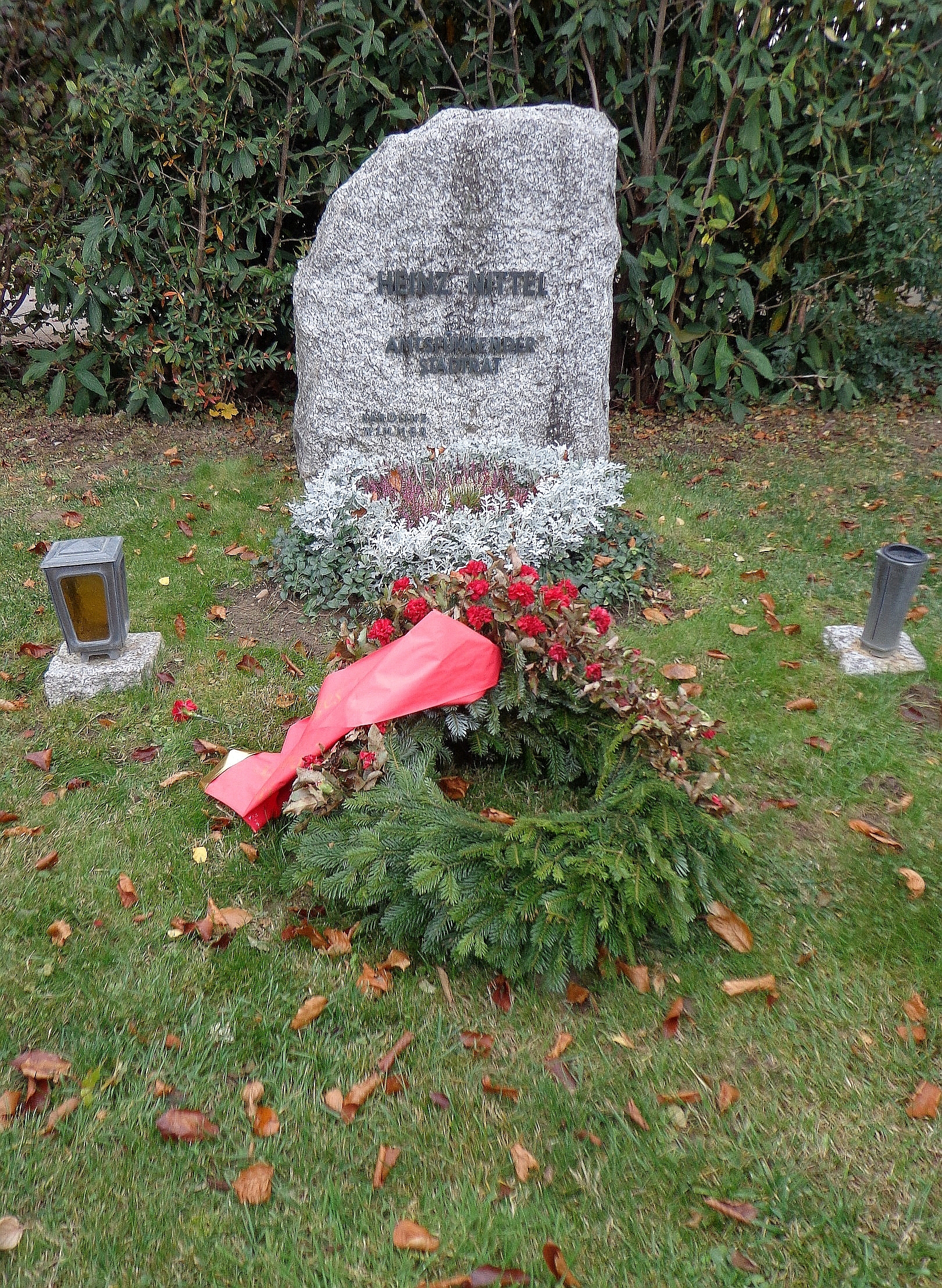 Wiener Zentralfriedhof - Gruppe 14 C, Ehrengrab von Heinz Nittel